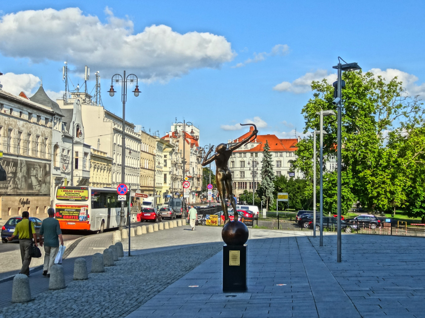 Rzeźba Łuczniczka Nova ustawiona przed Operą Nova w Bydgoszczy w 2013 roku